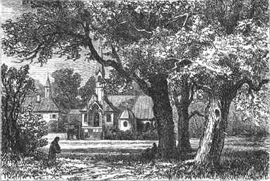 Kloster und Wallfahrtskirche Maria Eich